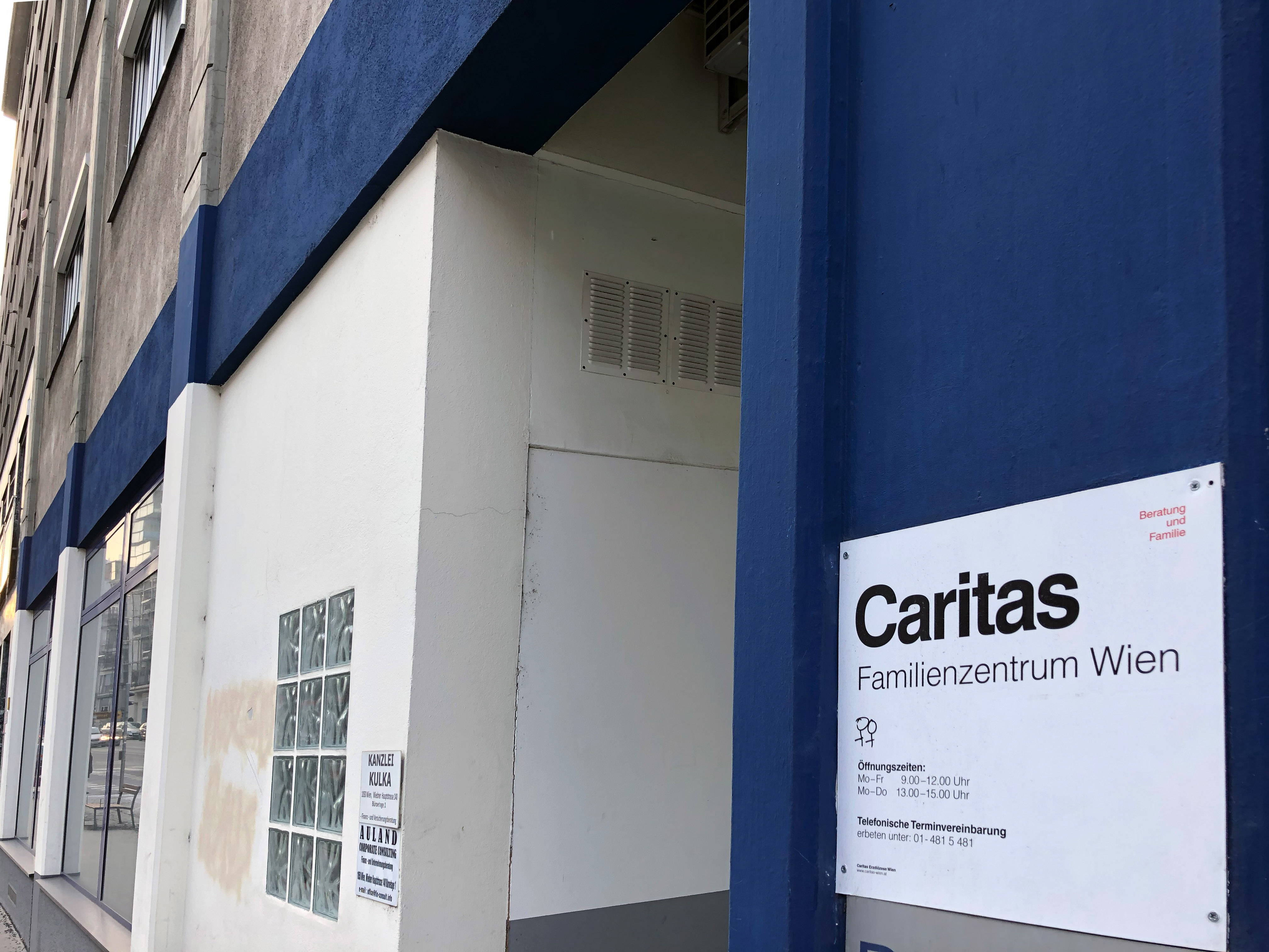 Familienzentrum Caritas 1050 Wien, Wiedner Hauptstrasse 140